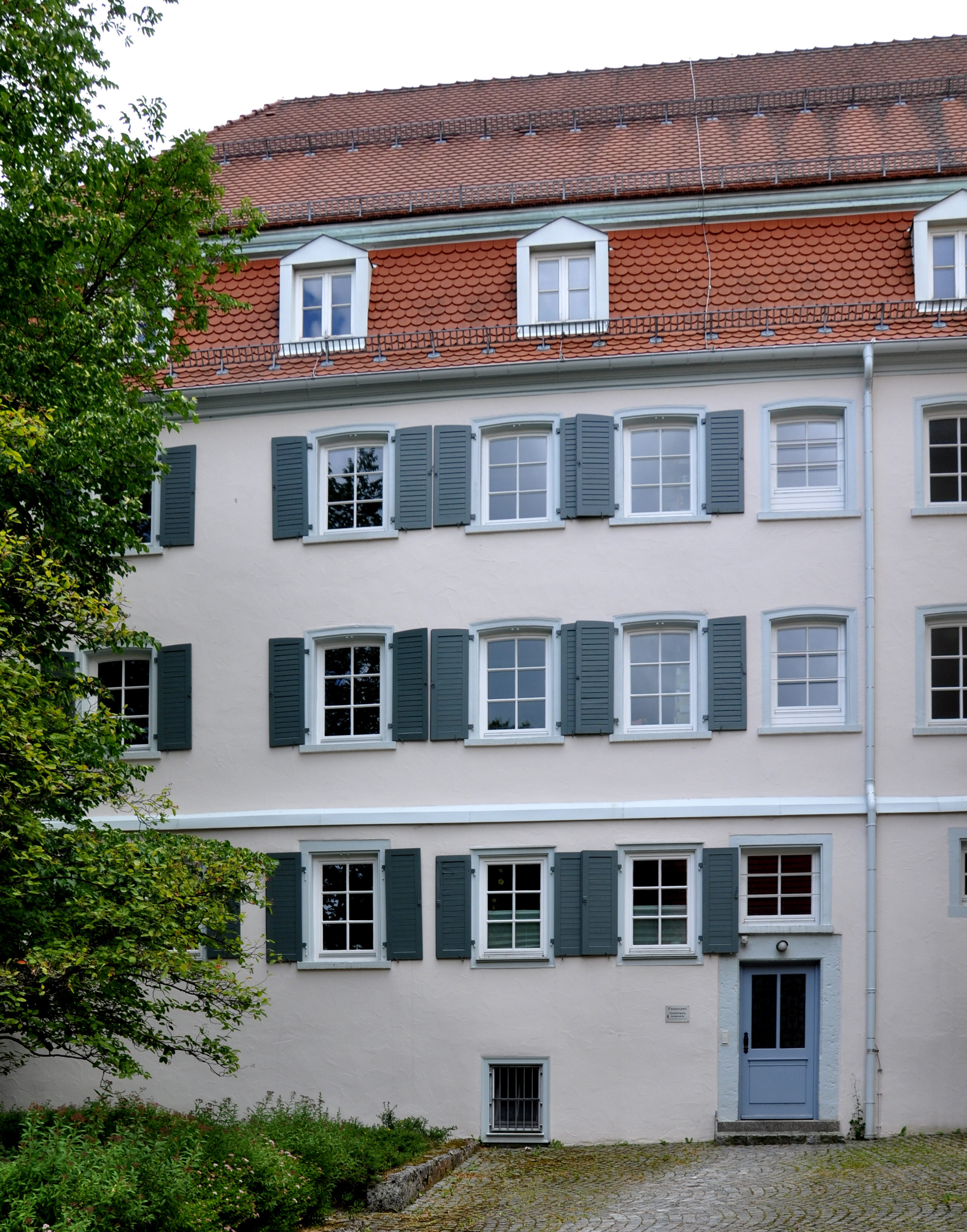 Münsingen, Finanzamt (ehem. Kameralamt), Beim Oberen Tor 2 (im Schlosshof-Bereich)